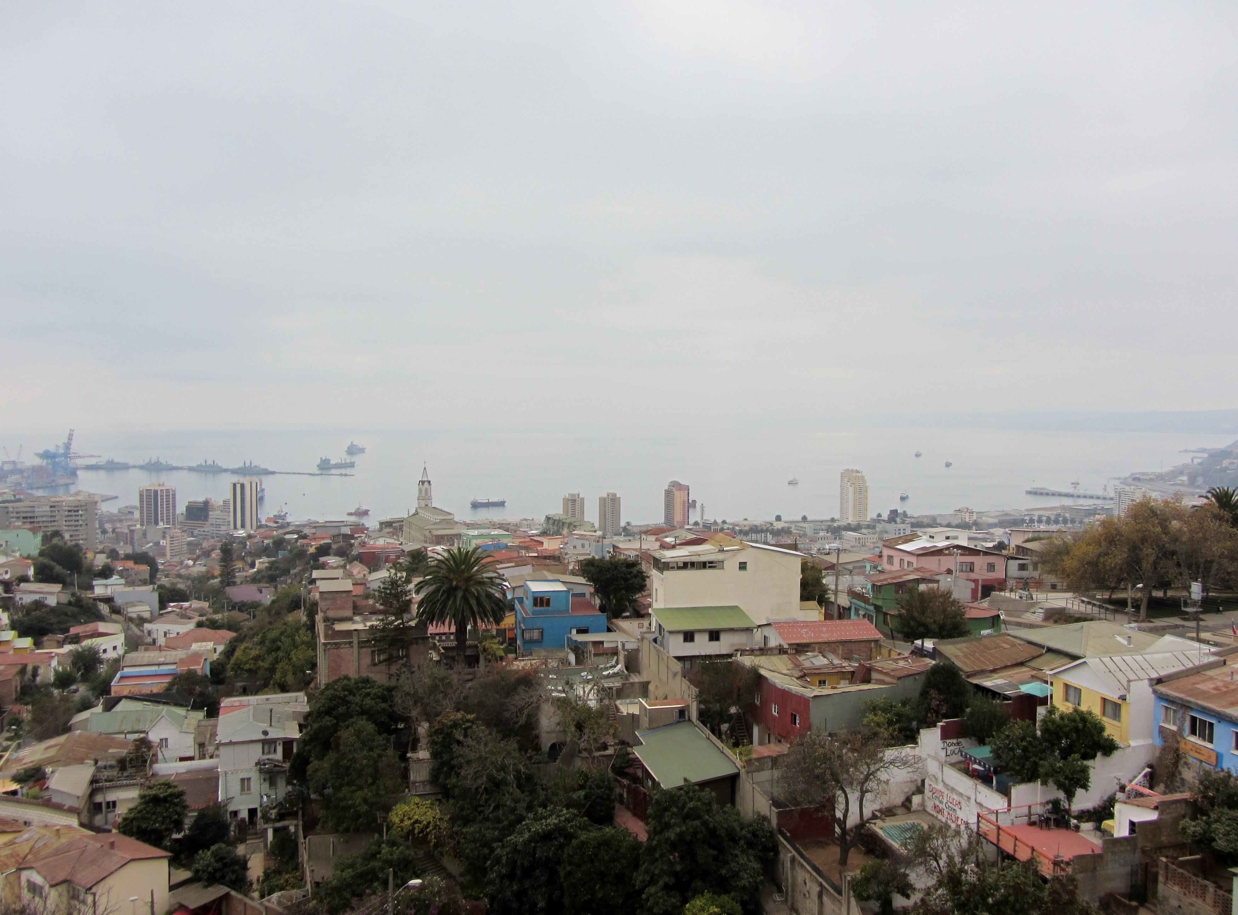 La Sebastiana